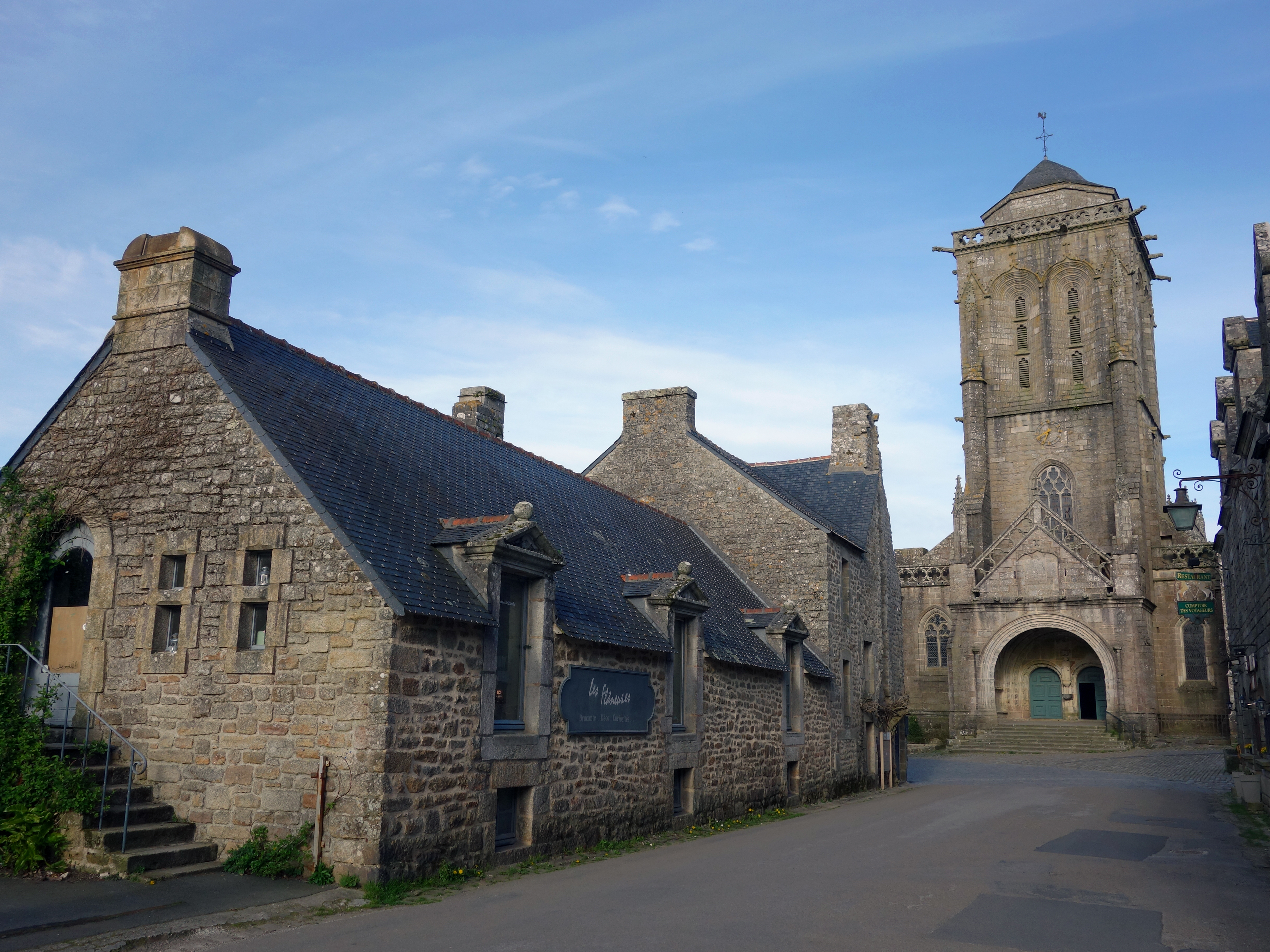 En arrivant devant l'édifice...